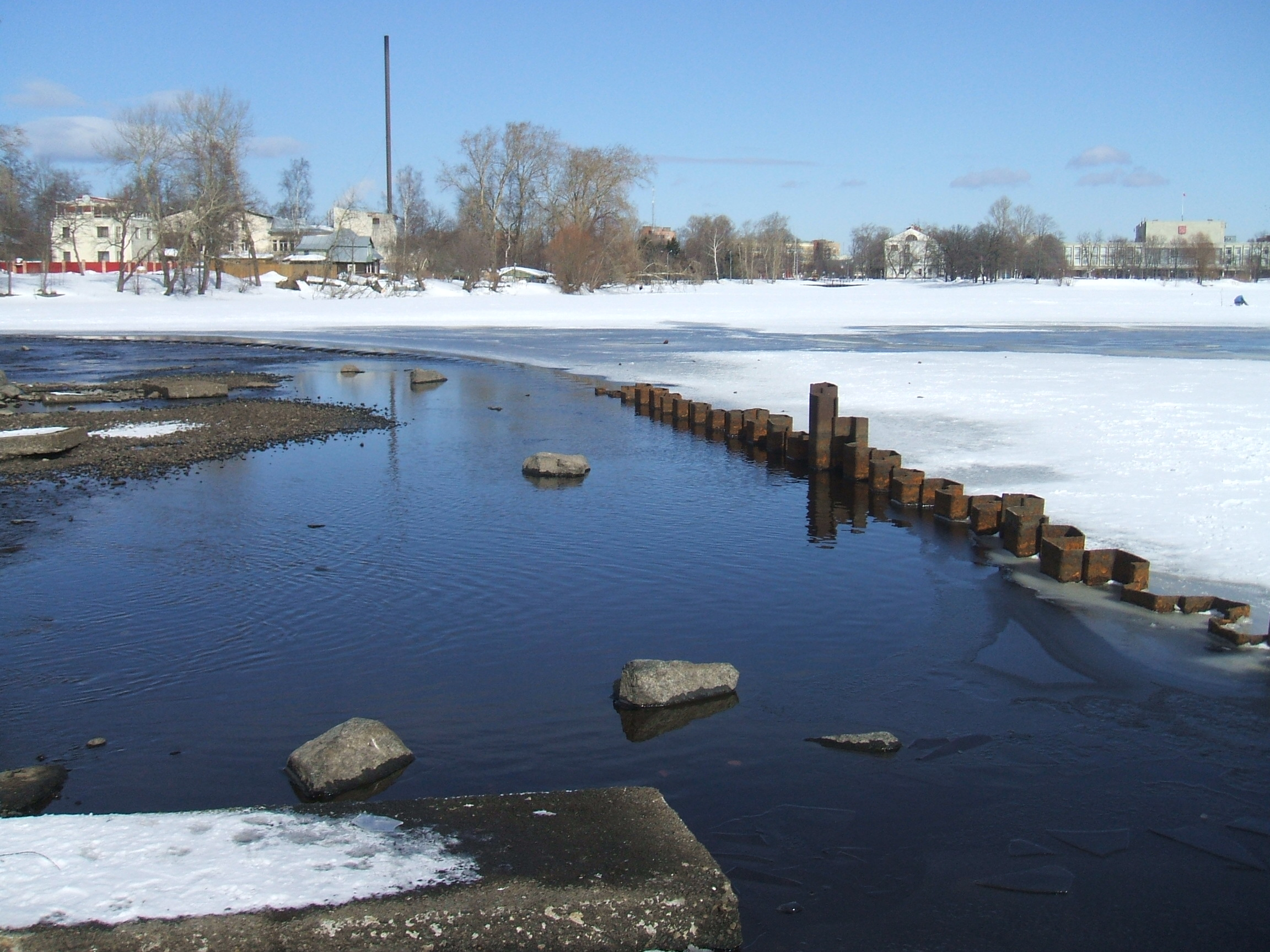 Сестрорецкий Разлив Плотины